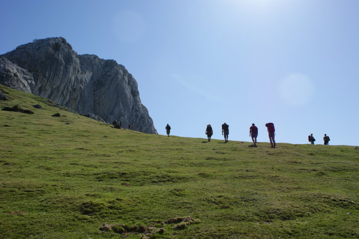 Escaladores subiendo a escalar a Mugarra.